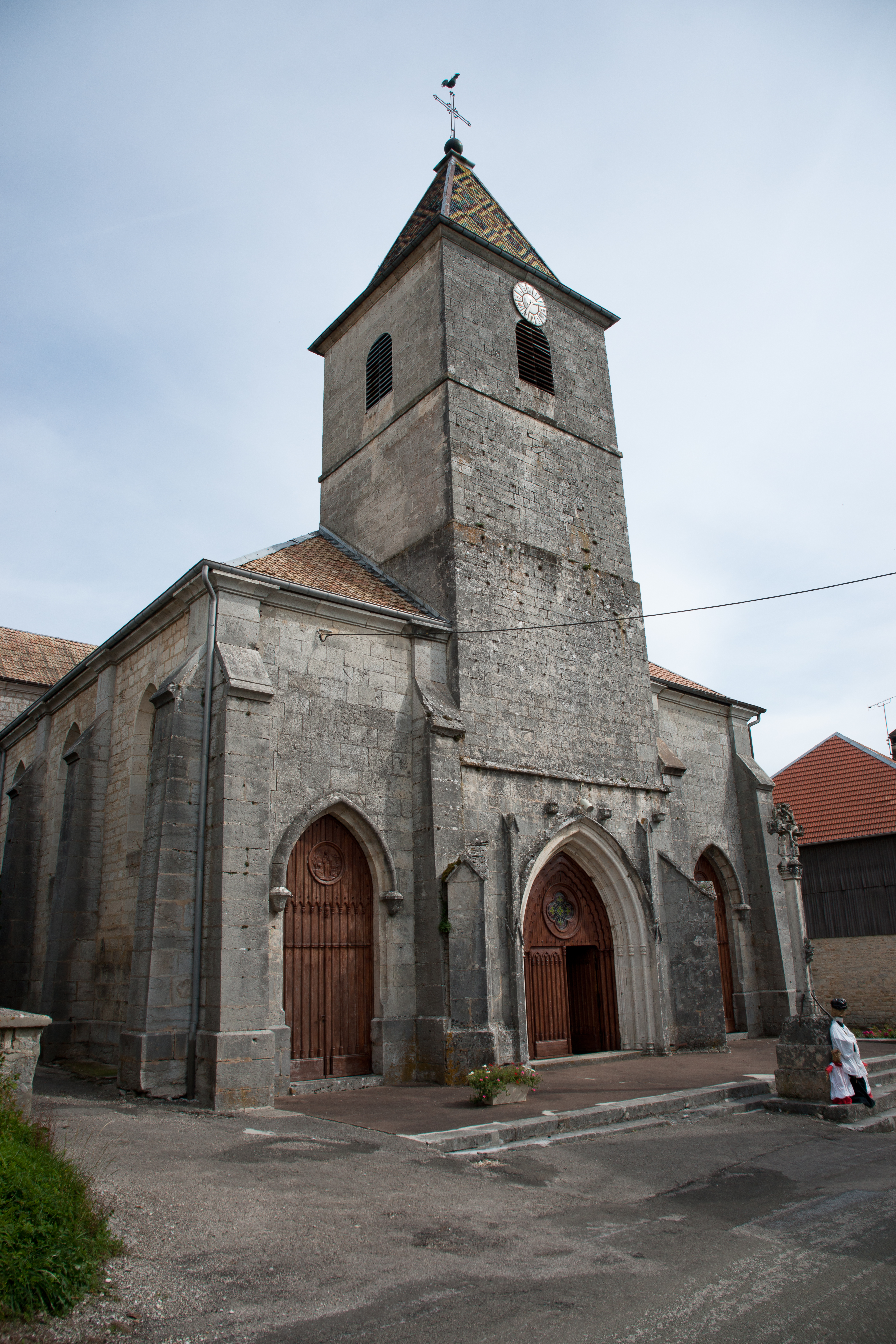 Amathay-Vésigneux - église